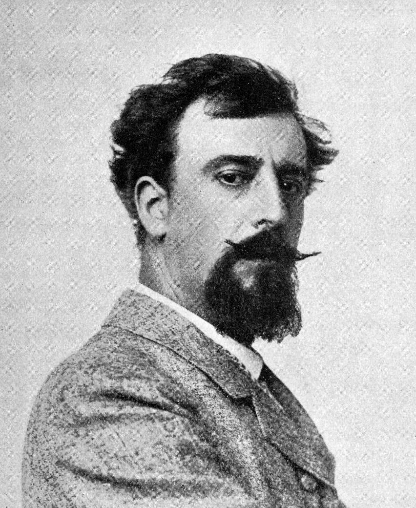 Jakob Schikaneder (1855–1924)